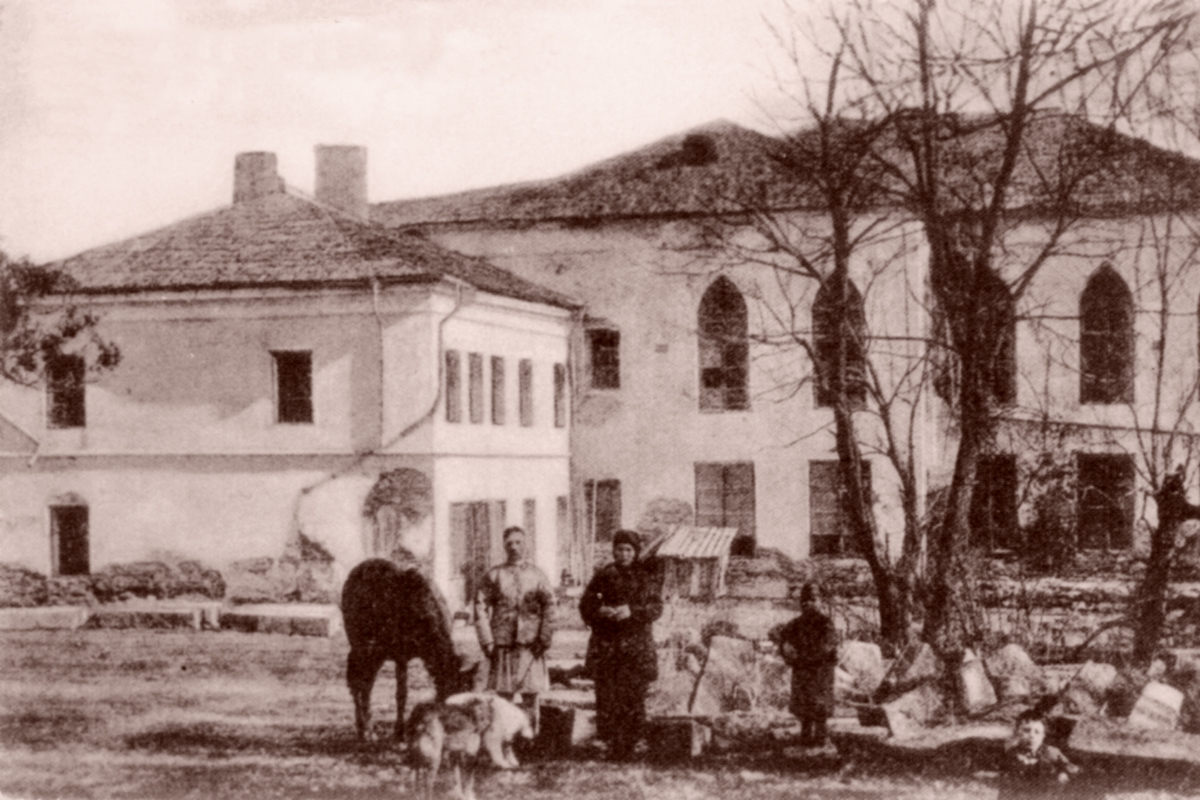 Fosta casă a lui Costache Negri din Târgu Ocna în anul 1900, înainte de a cădea la cutremurul din anul următor. Colecția Gheorghe Sion.